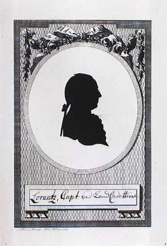 Didrik Carl Lorentz (1749-1832), Danish General